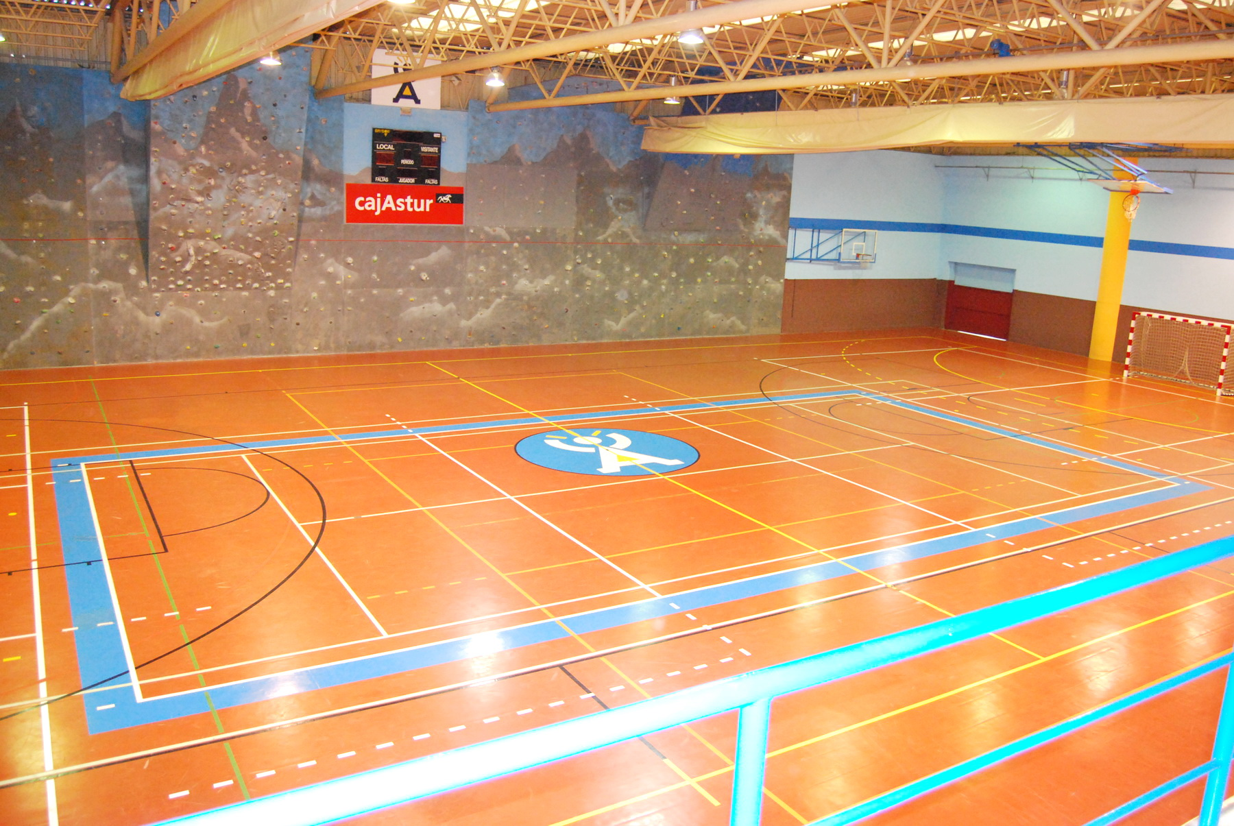 Polideportivo de Los Canapés, sede del equipo AD La Curtidora de Superliga-2 Femenina